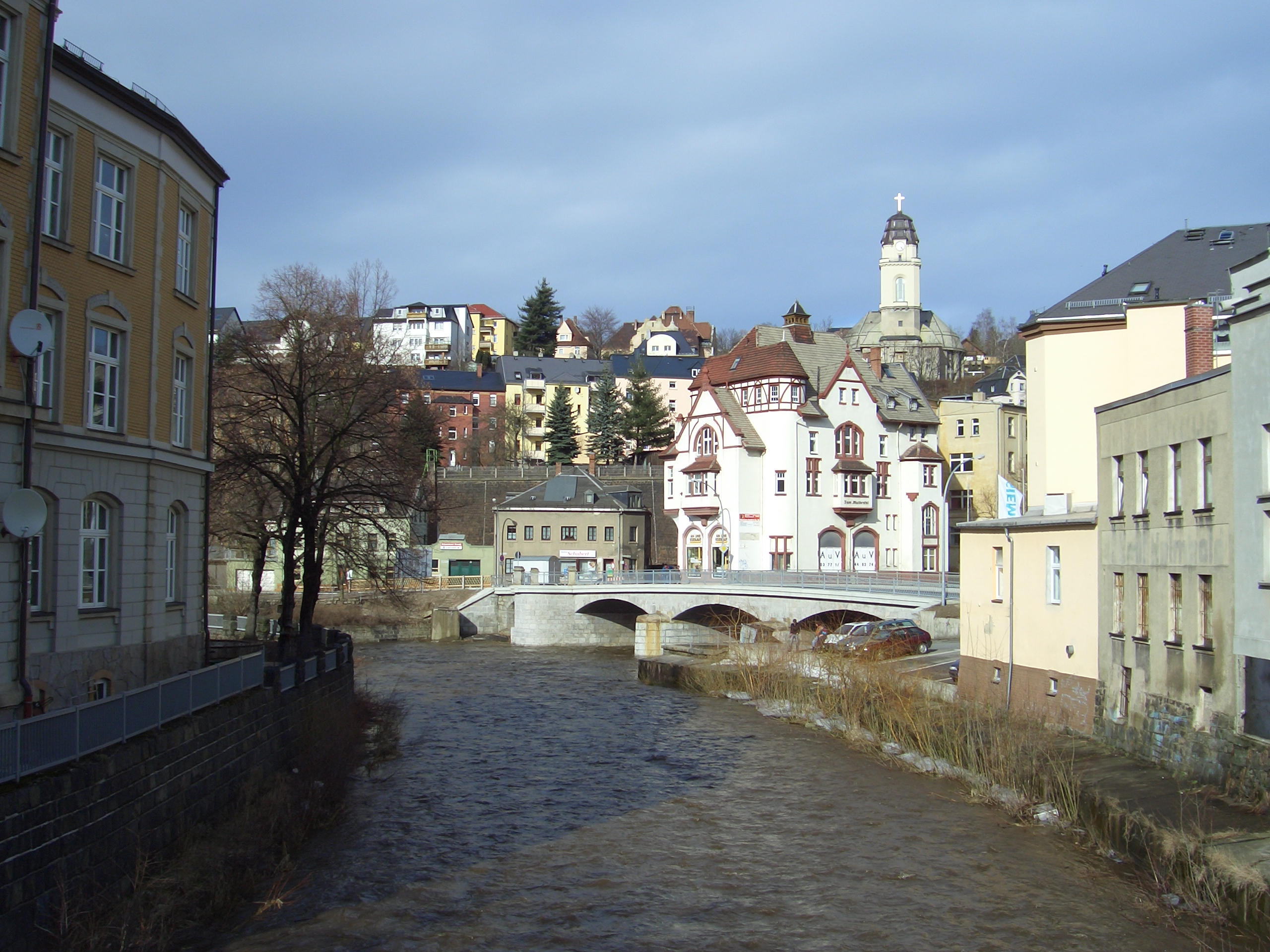 la rivereto Zwickauer Mulde.